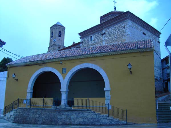 Lonja - trinquete de Barrachina Construida en 1904